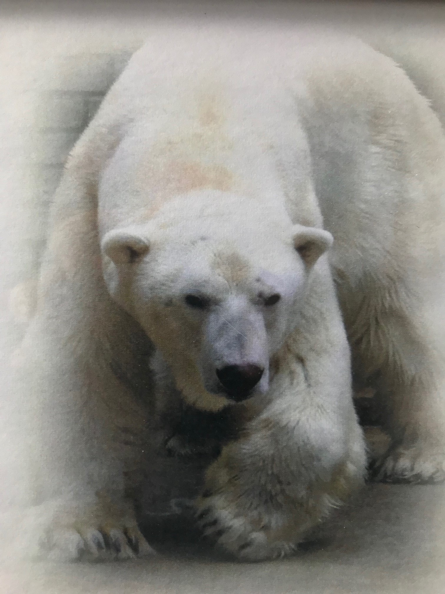 Jääkaru Franz